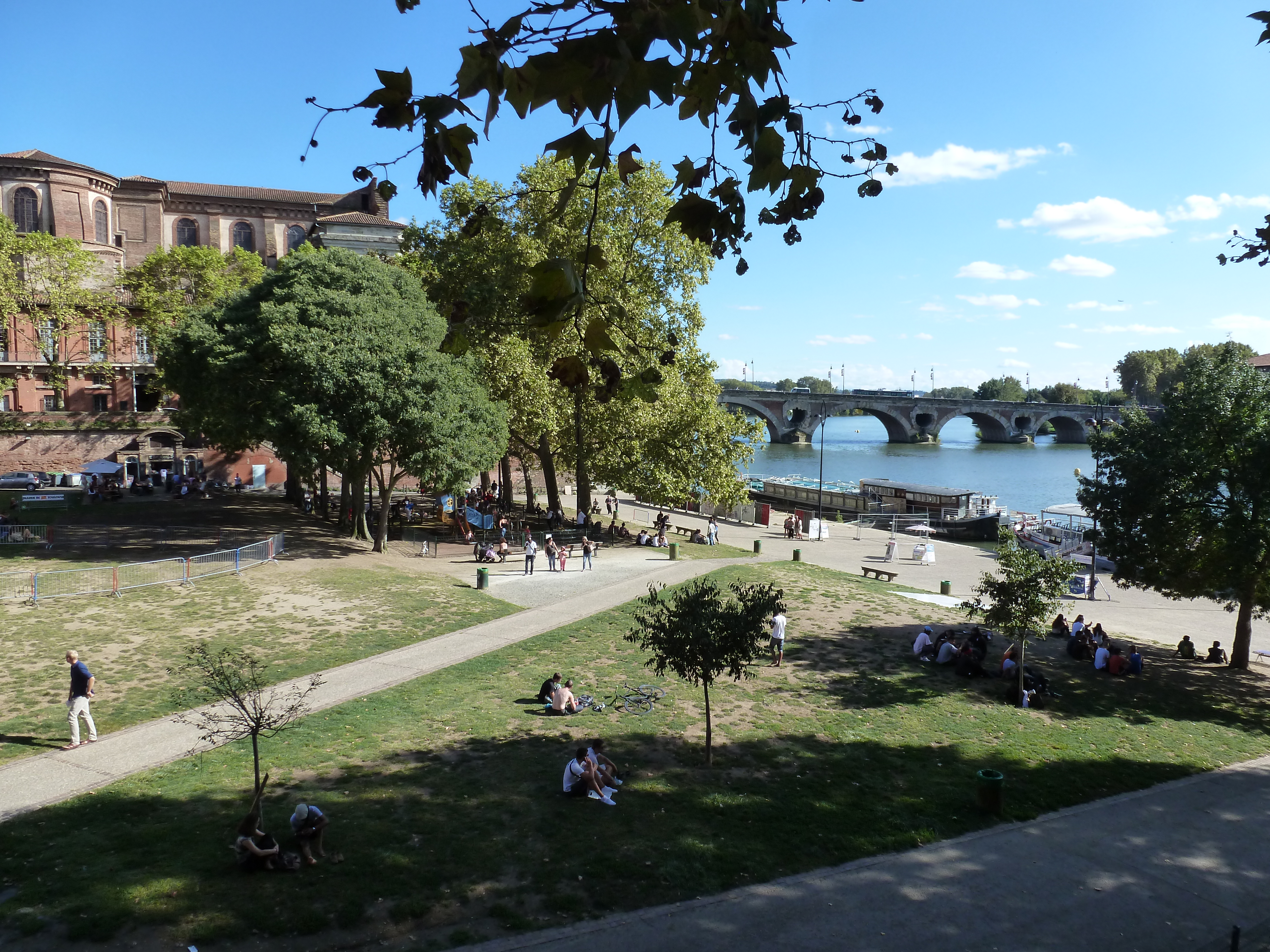 Toulouse - Place de la Daurade (2014)